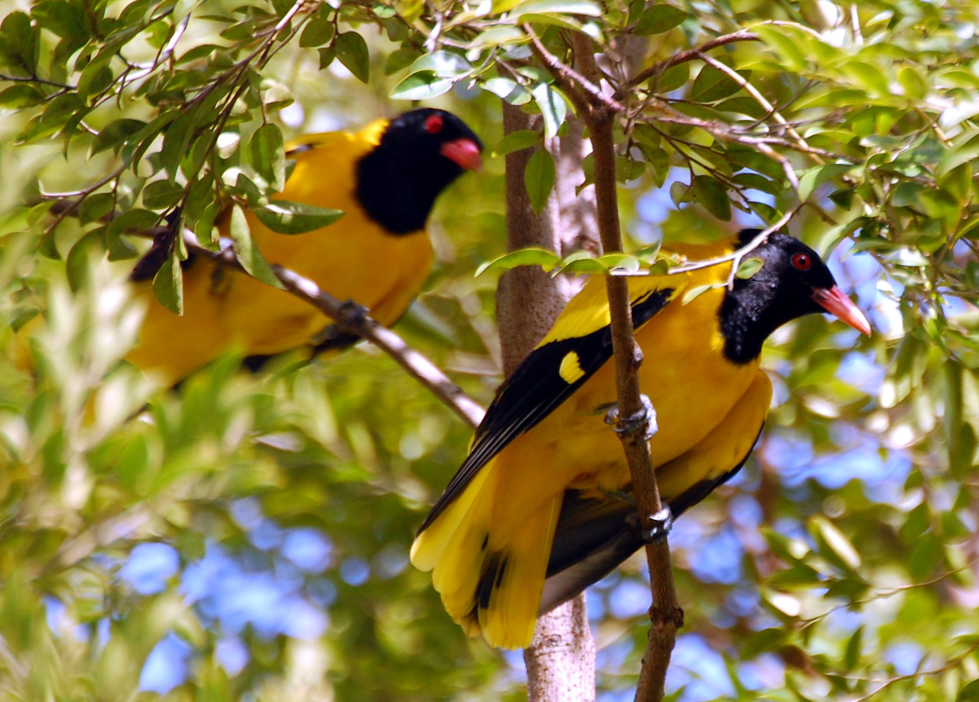 പൂവനും പിടയും കാഴ്ചക്ക് ഒരു പോലെയിരിക്കും